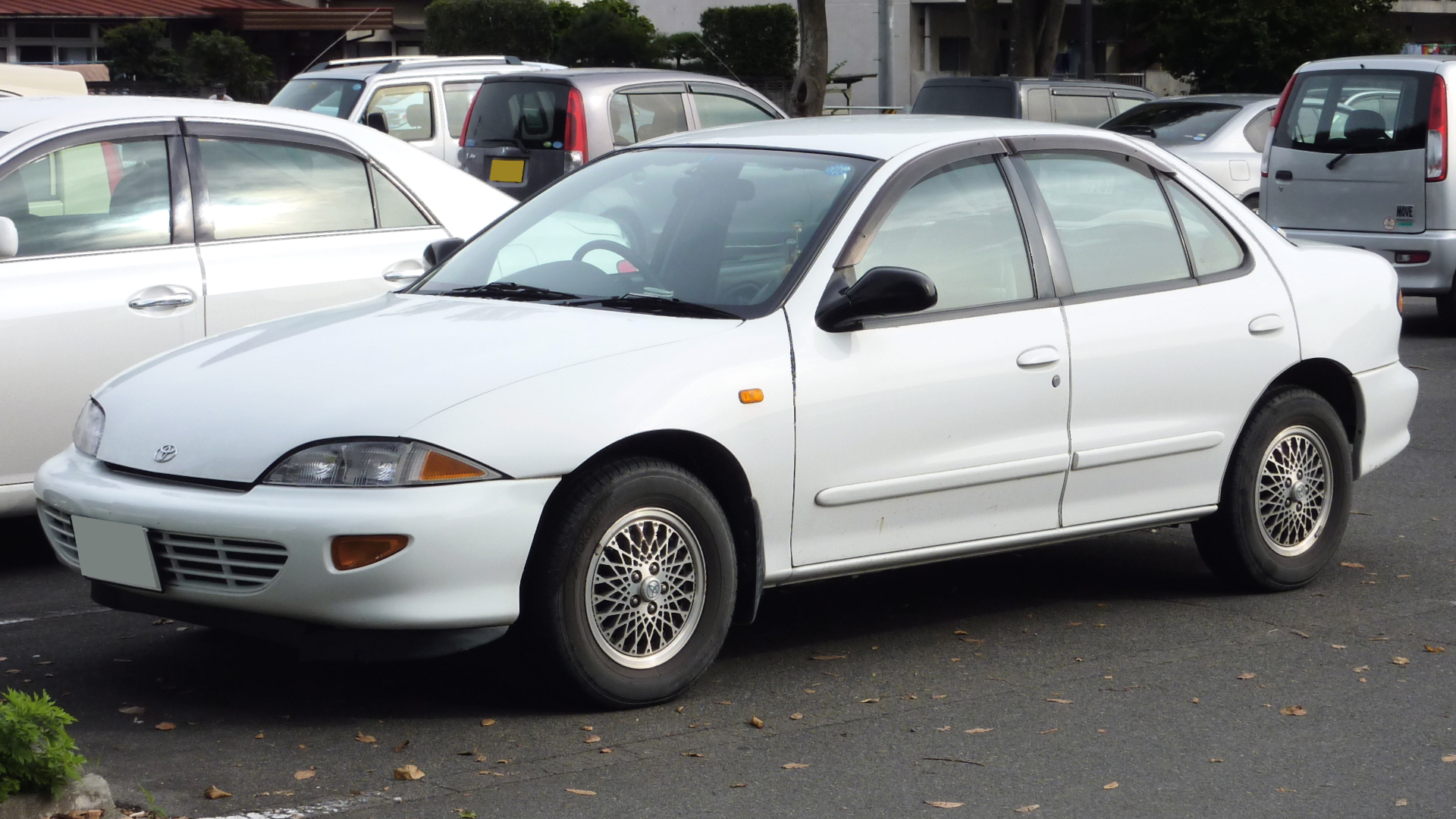 トヨタ・キャバリエセダン